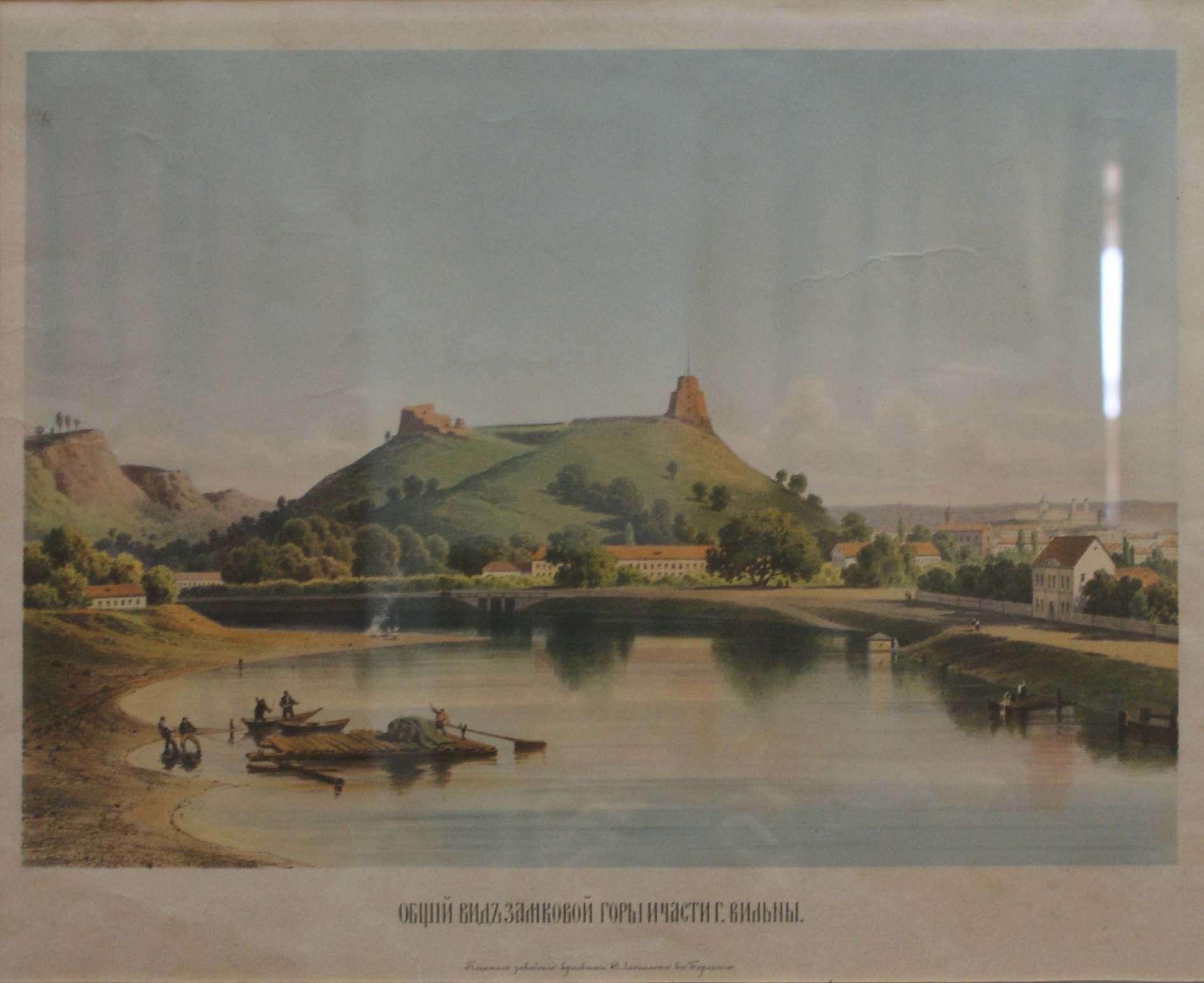 Васіль Гразноў. Краявід з замкавай гары і горада Вільні. Друкарская ўстанова В. Ласілот, Берлін. Хромалітаграфія